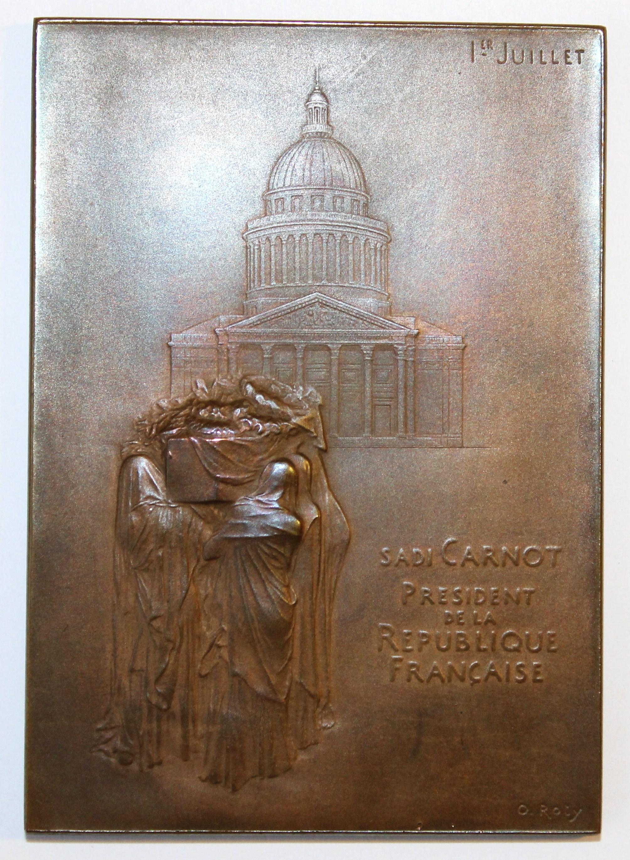 Plaquette en bronze gravée par Oscar Roty à l'occasion des funérailles de Sadi Carnot le 1 juillet 1894. Le cercueil est porté vers le Panthéon. Inscription: Sadi Carnot Président de la République.